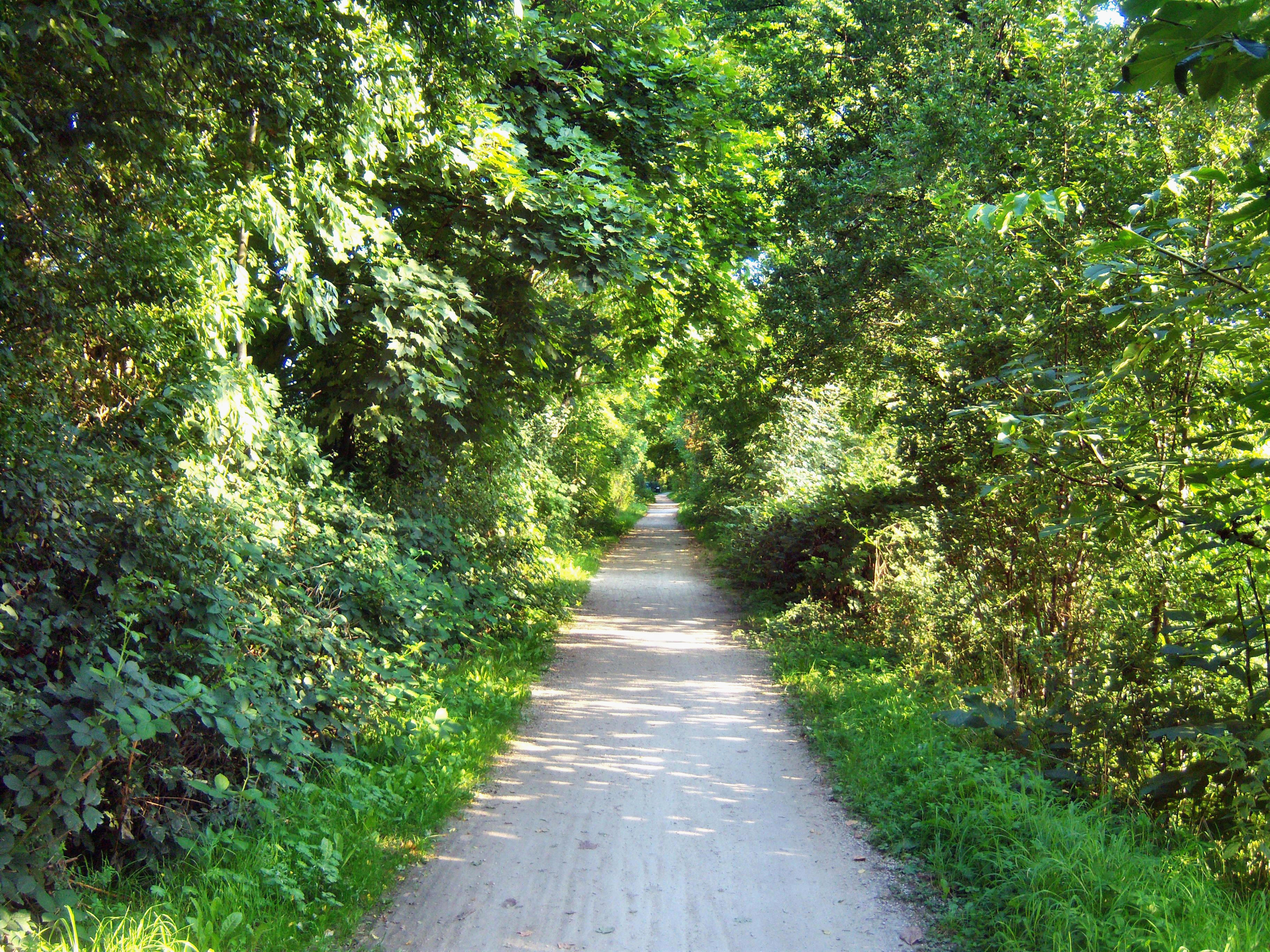 Fahrradweg zwischen Worms-Neuhausen und Worms-Herrnsheim auf alter Bahnstrecke Worms-Gundheim in Rheinhessen (Deutschland)